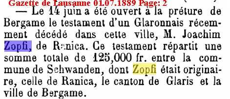 Pubblicazione sulla Gazette de Lausanne del 1.7.1889 dell'apertura del testamento di Gioacchino Zopfi, avvenuta a Bergamo il 14.6.1889, in cui si comunica che l'industriale di Ranica ha lasciato 125.000 franchi da ripartire tra i comuni di Ranica, di Bergamo, di Schwanden (suo paese d'origine) e il Cantone di Glarona.